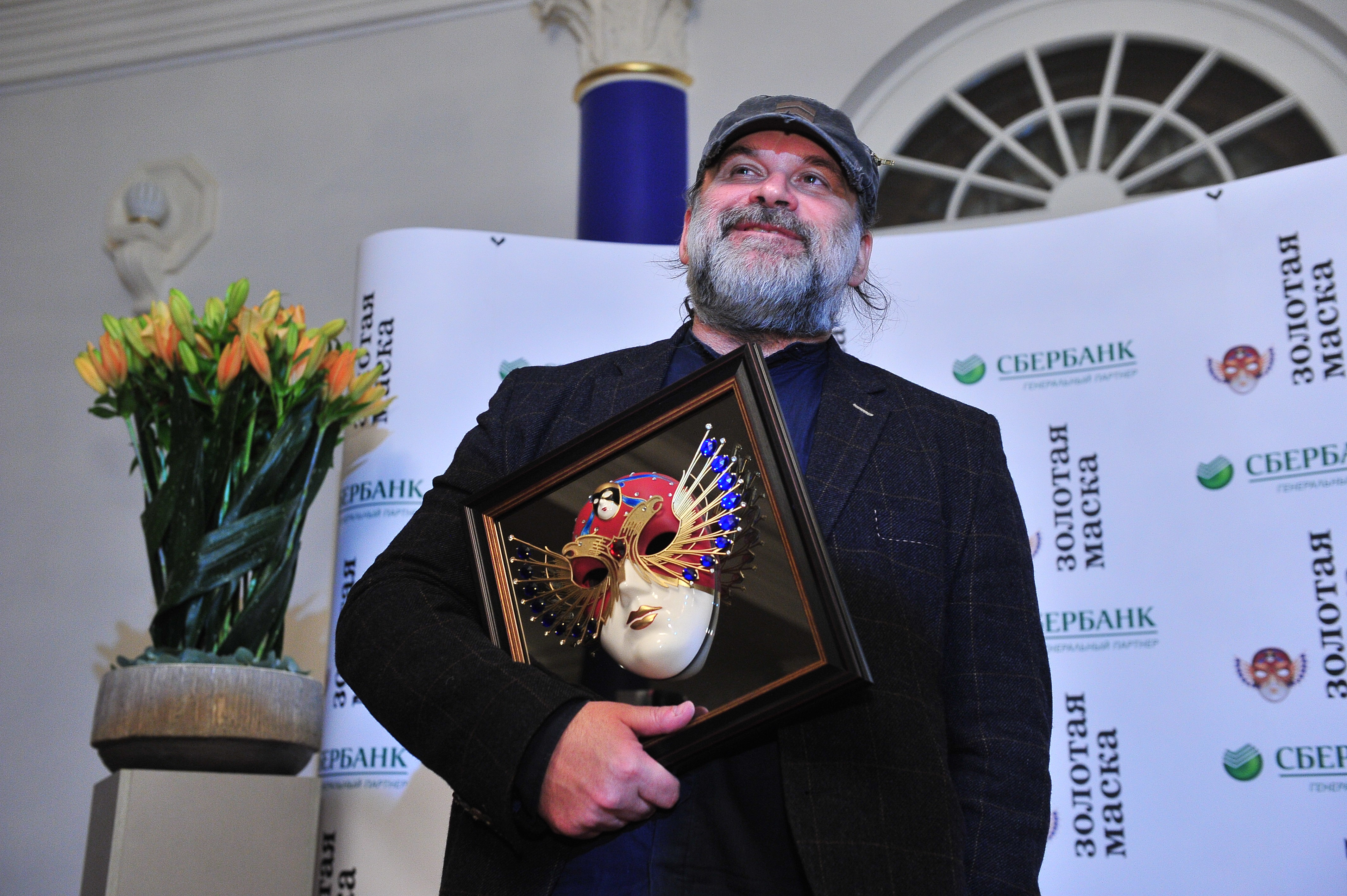 Golden Mask Award 2016. Moguchiy Andrey A.